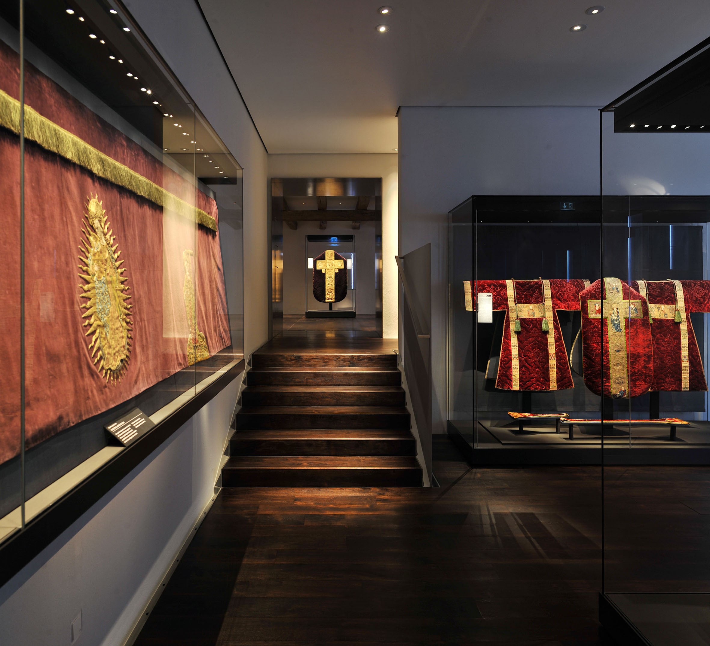 StiftsMuseum Xanten, Raum 7